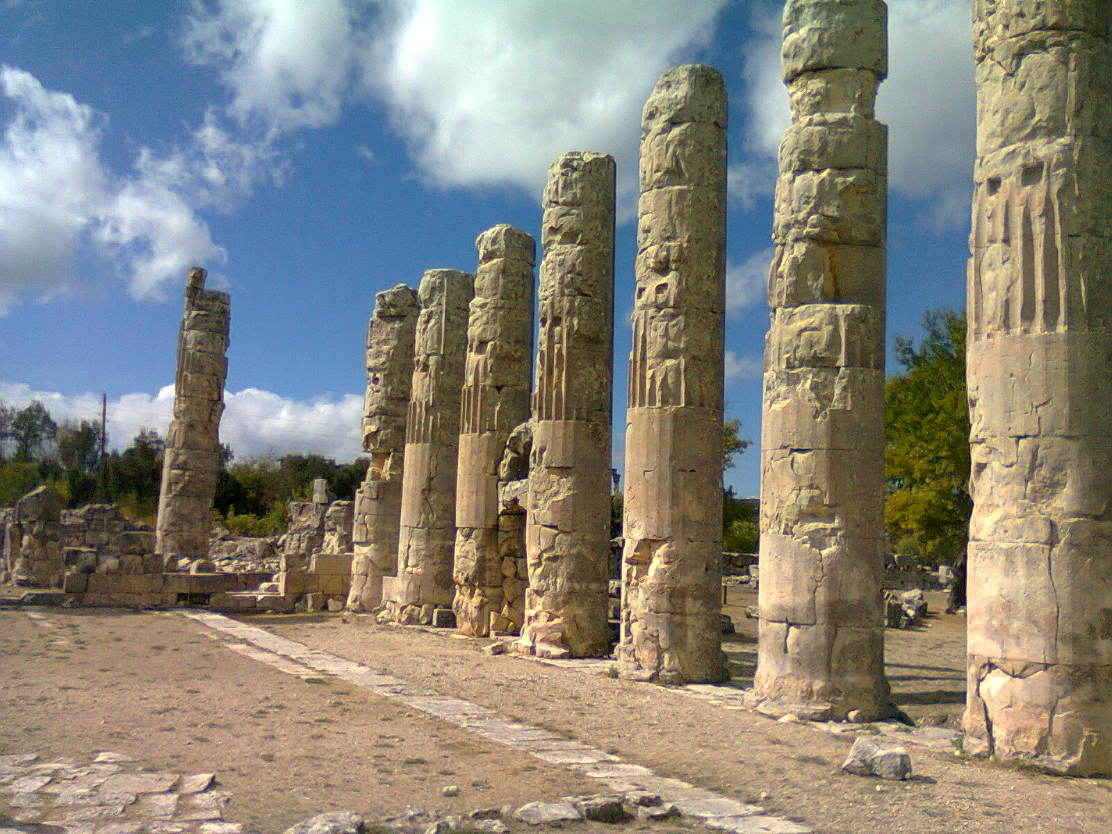 Zeus Tapınağı kalıntılarından bir görünüm.